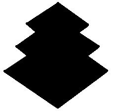 Image faite sous paint, qui représente le mon (blason japonais) du clan Ogasawara.